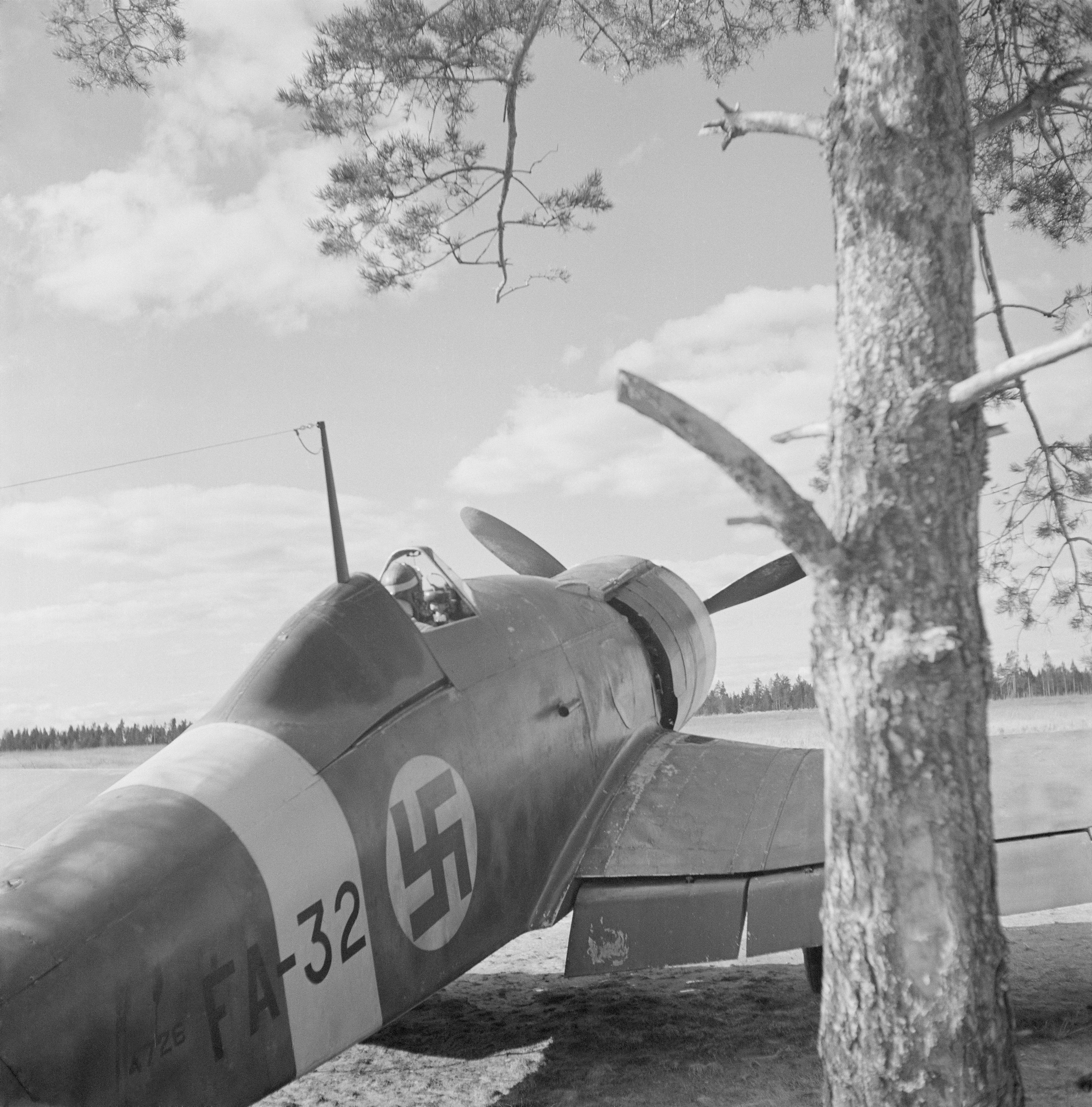 Päivystysvuorolla ja hälytystä odotetaan hartaasti. (Kuvassa on Lentolaivue 26:n Fiat G.50 (tunnus FA-32)). Kuvauspaikka: Rautu